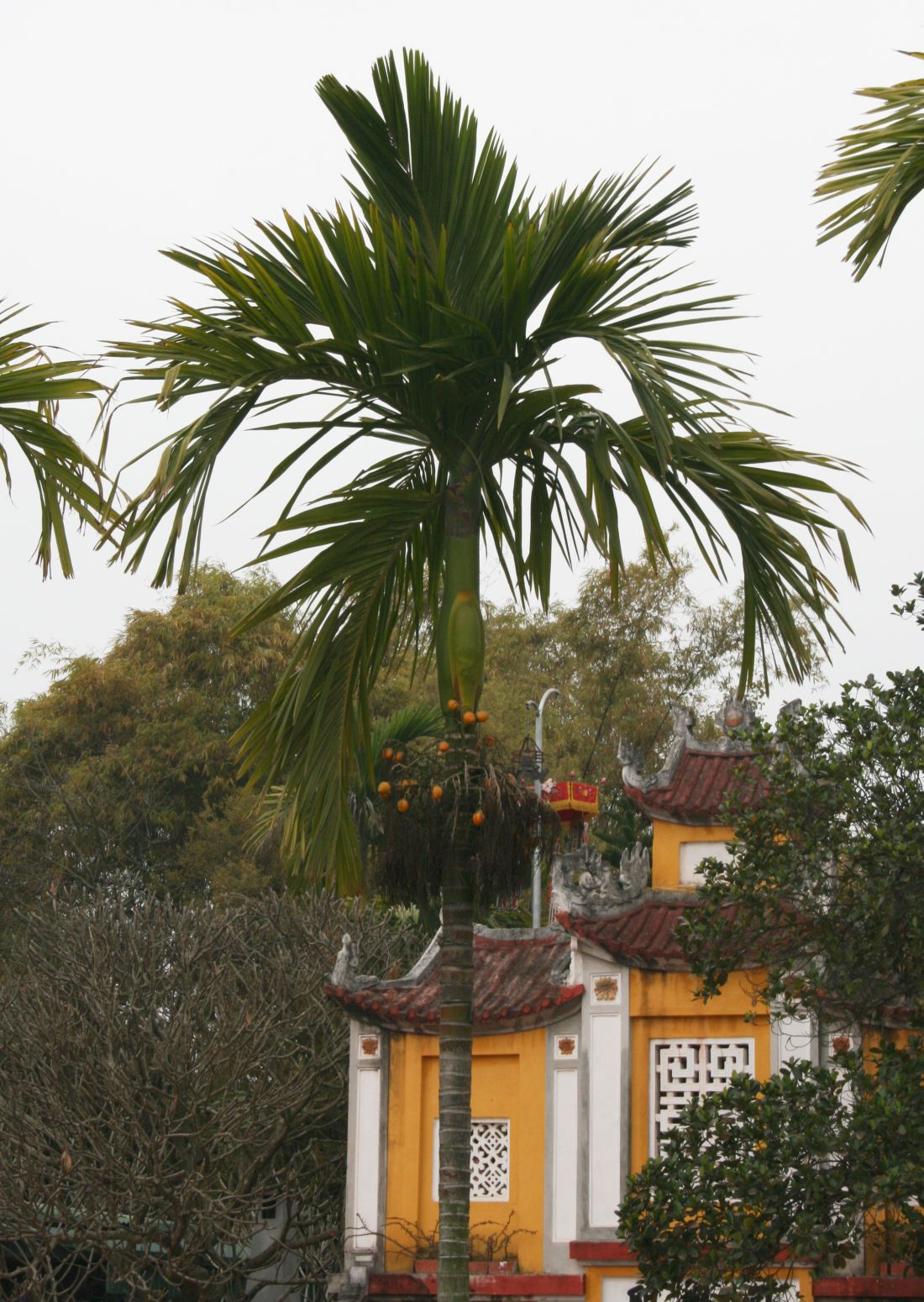 Areca catechu, Palmen (Arecaceae) - Vietnam/Việt Nam: Hanoi/Hà Nội, Ein-Säulen-Pagode/Chùa Một Cột